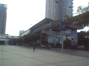 Camera: Panasonic EB-GD88